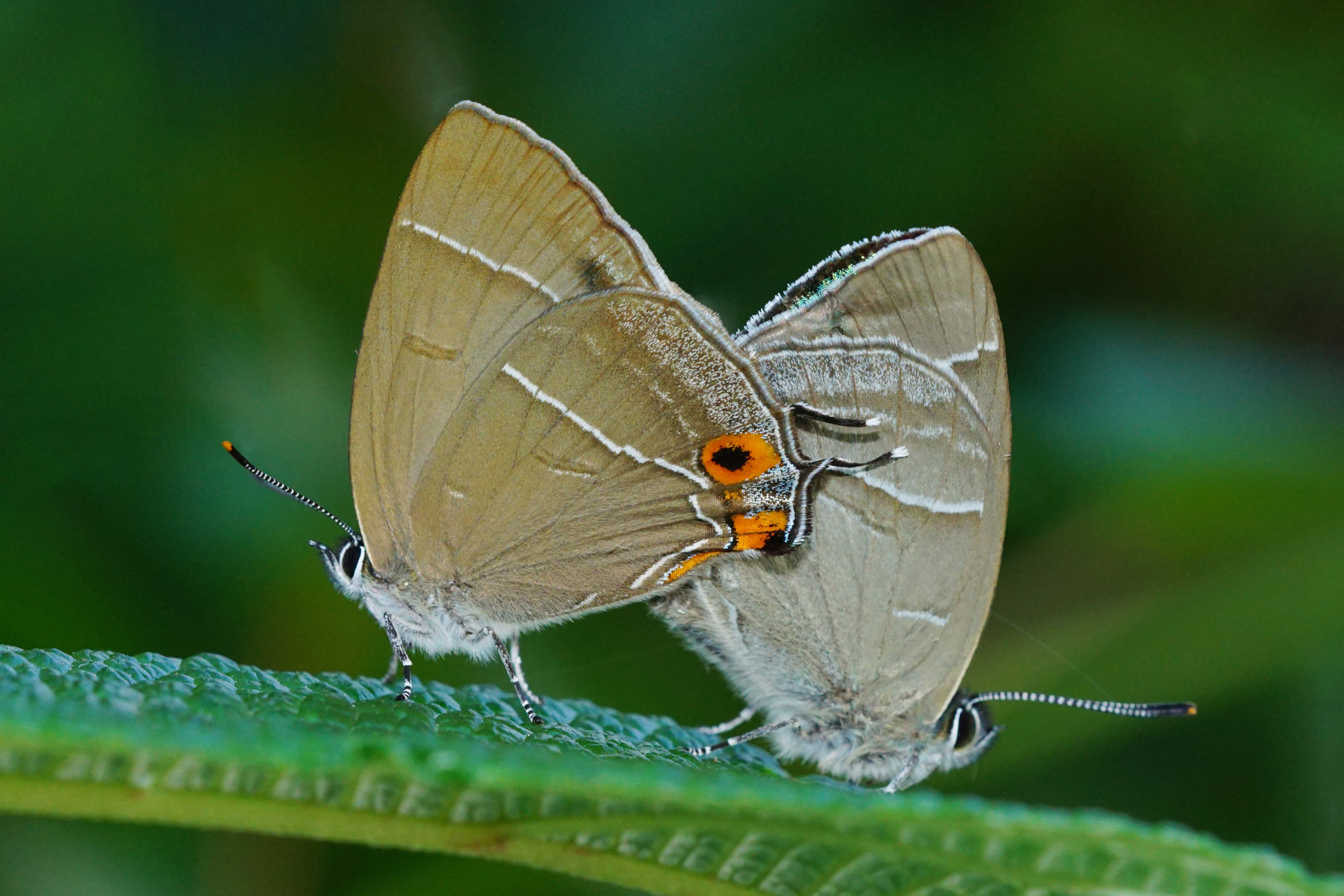 Chrysozephyrus esakii mating